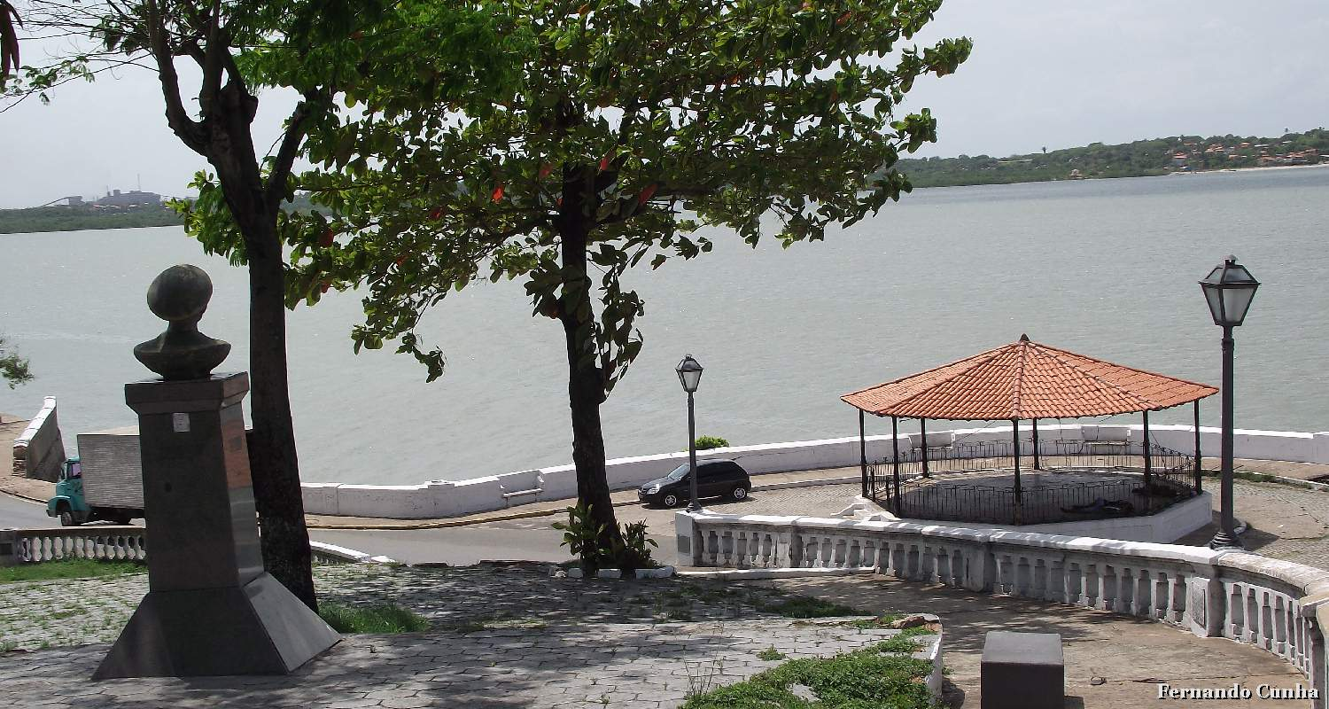 Praça Marcílio Dias e Avenida Beira Mar.